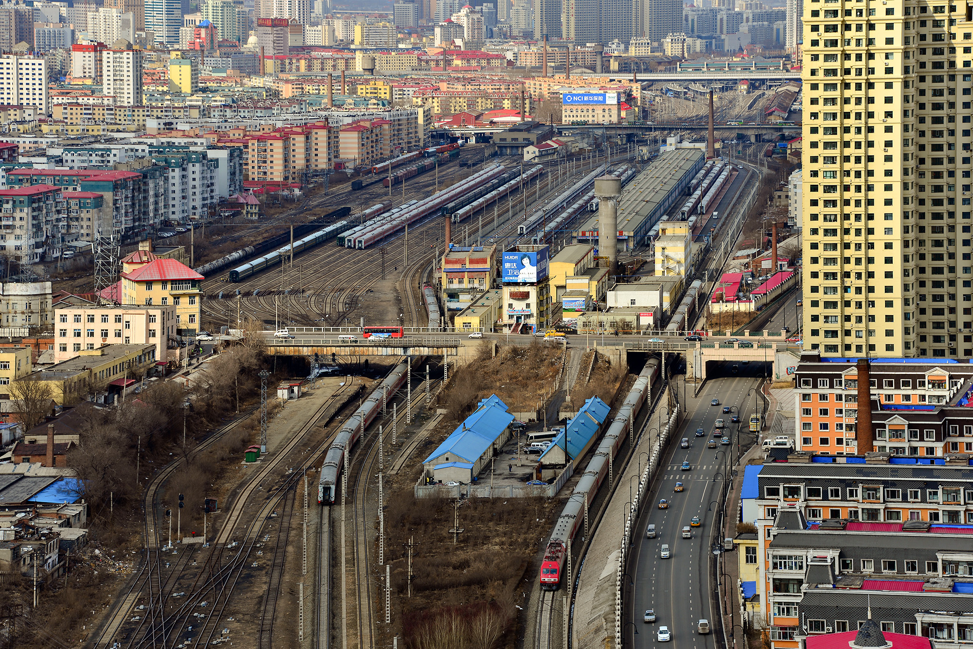 From Hengxiangcheng in Harbin.